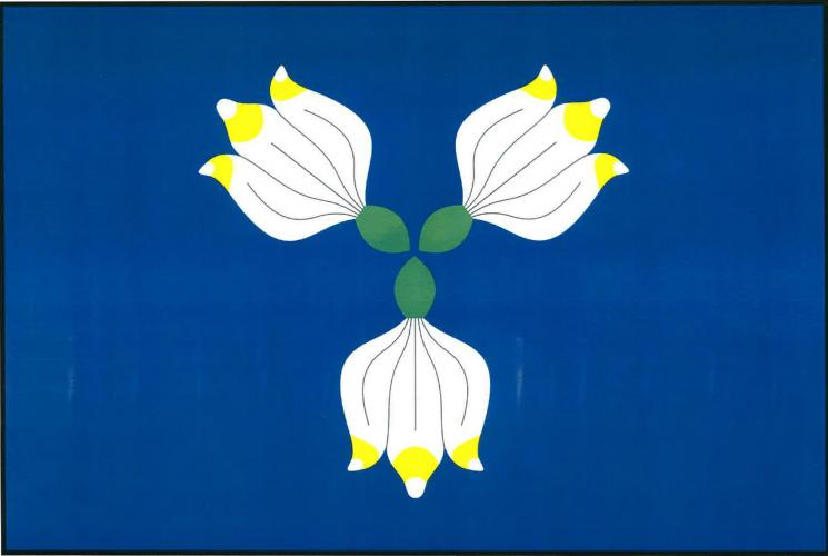 vlajka, Tasovice, okres Blansko